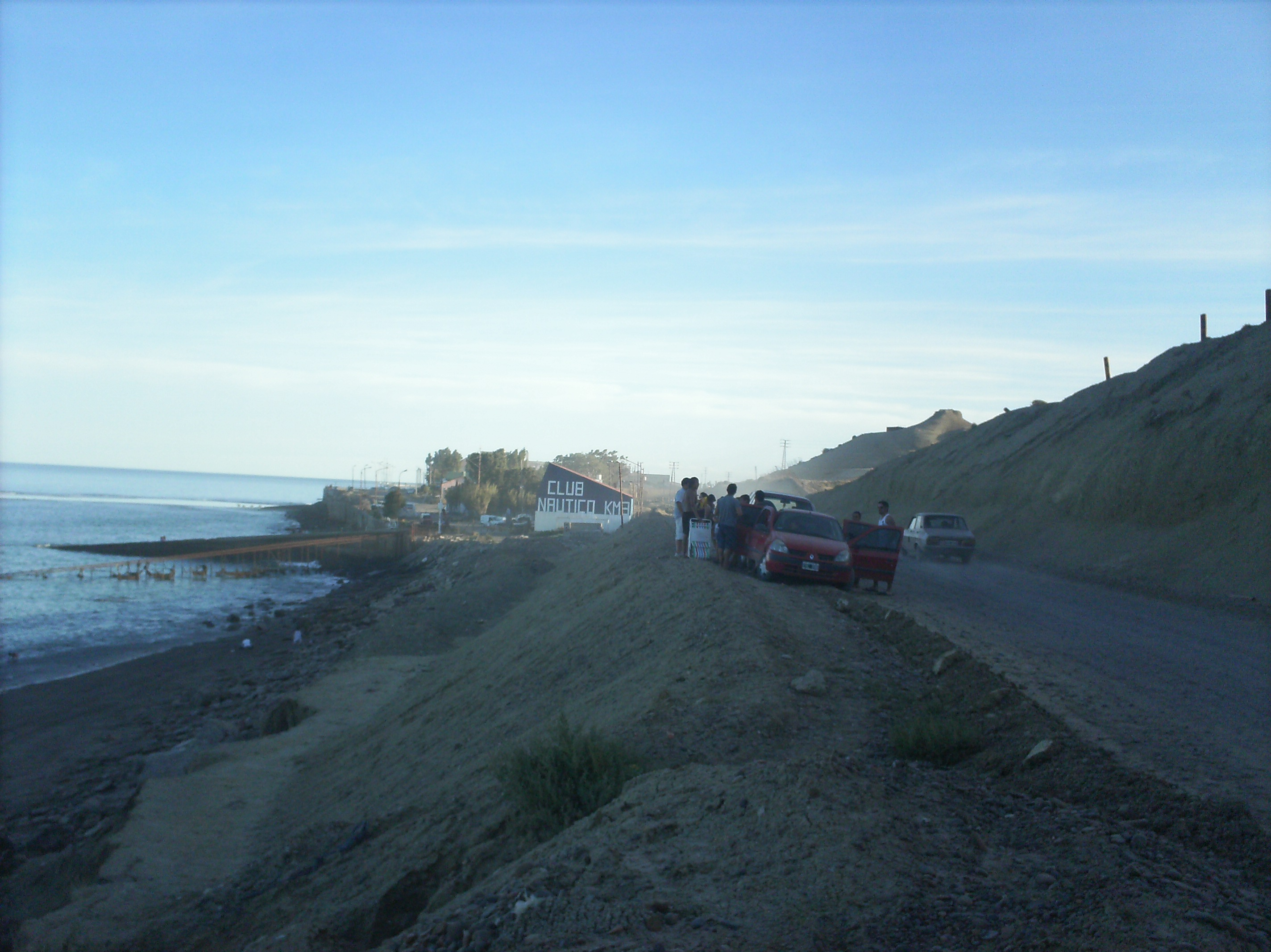 playa del barrio cercana al nautico de este barrio